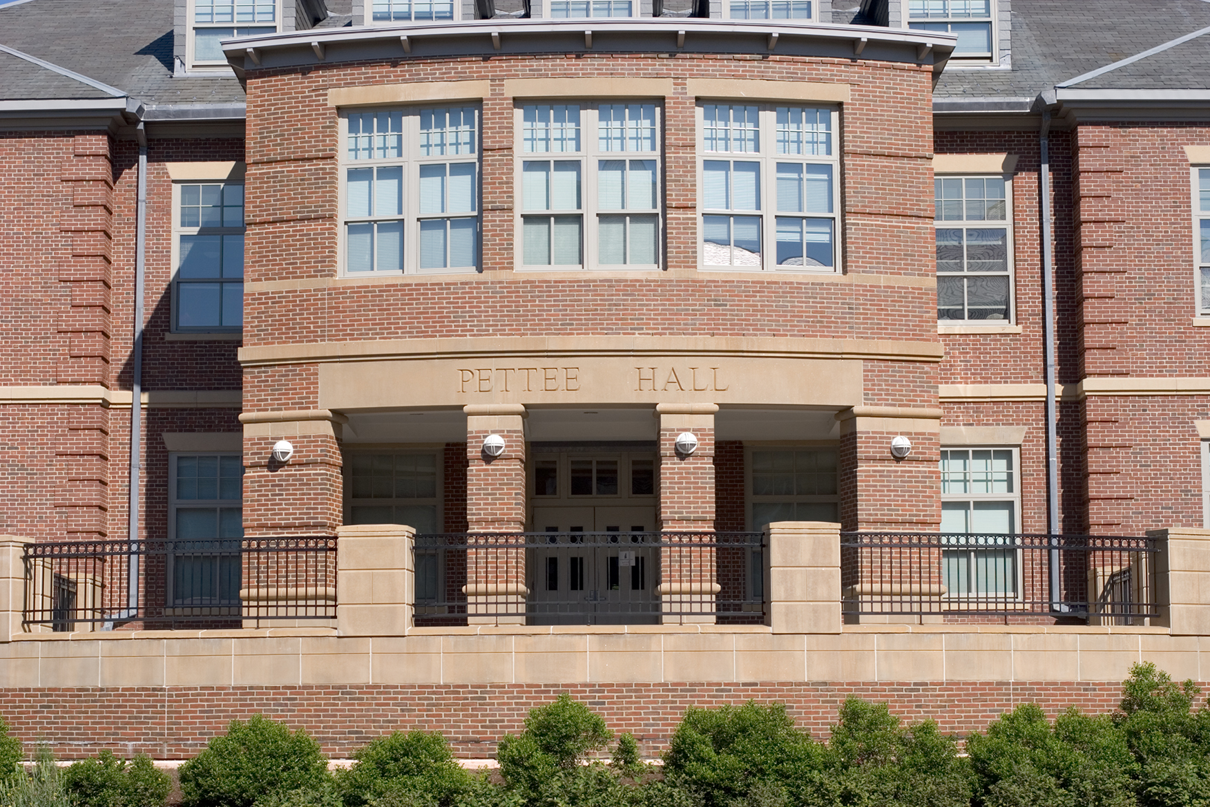 Durham, NH.